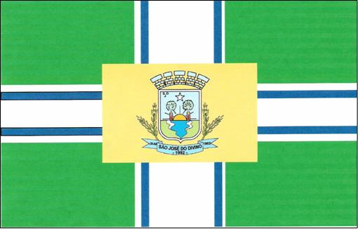 Bandeira da cidade de São José do Divino.